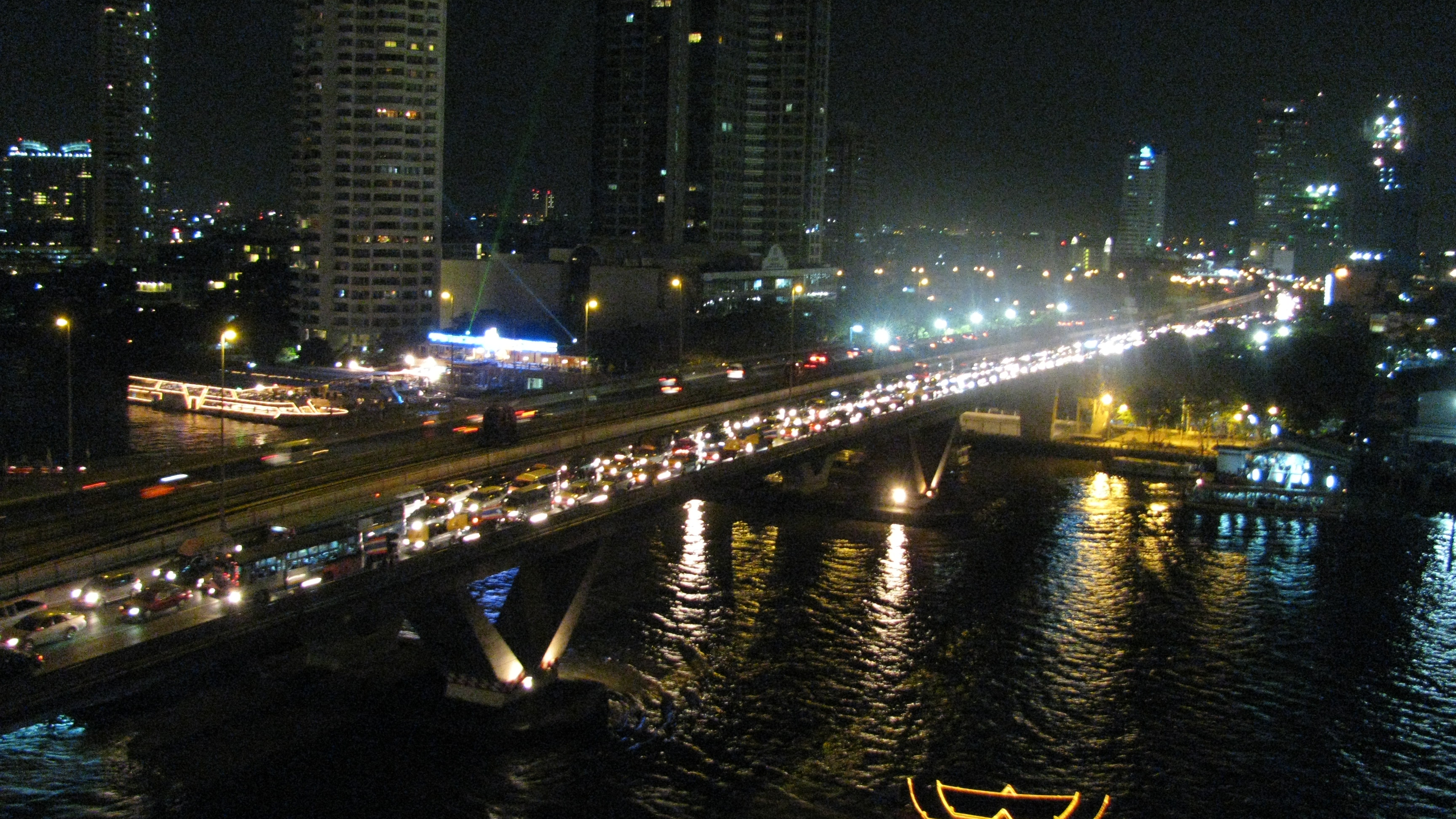 Bangkok